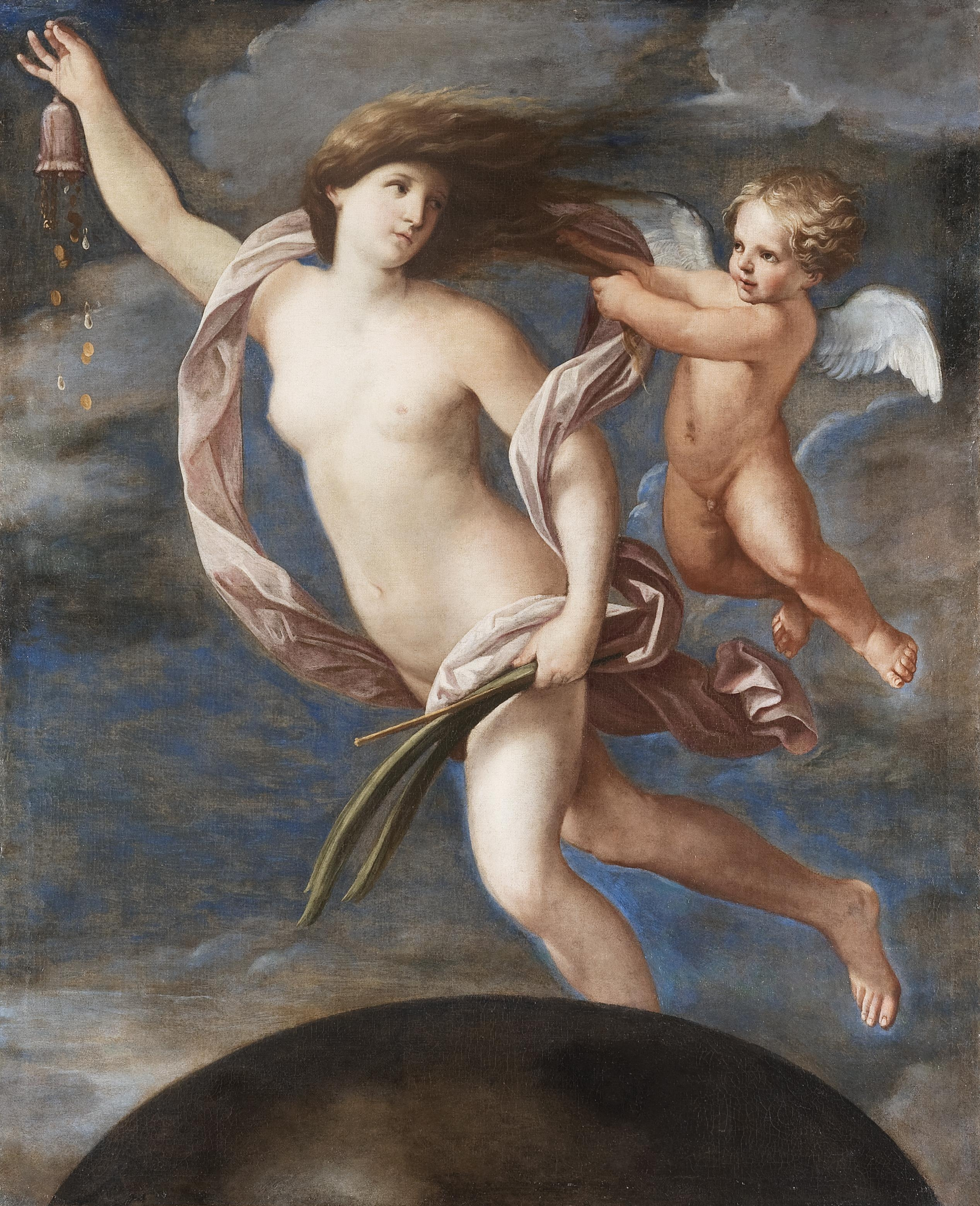 Fortuna e Amore Olio su tela 161 x 131 cm